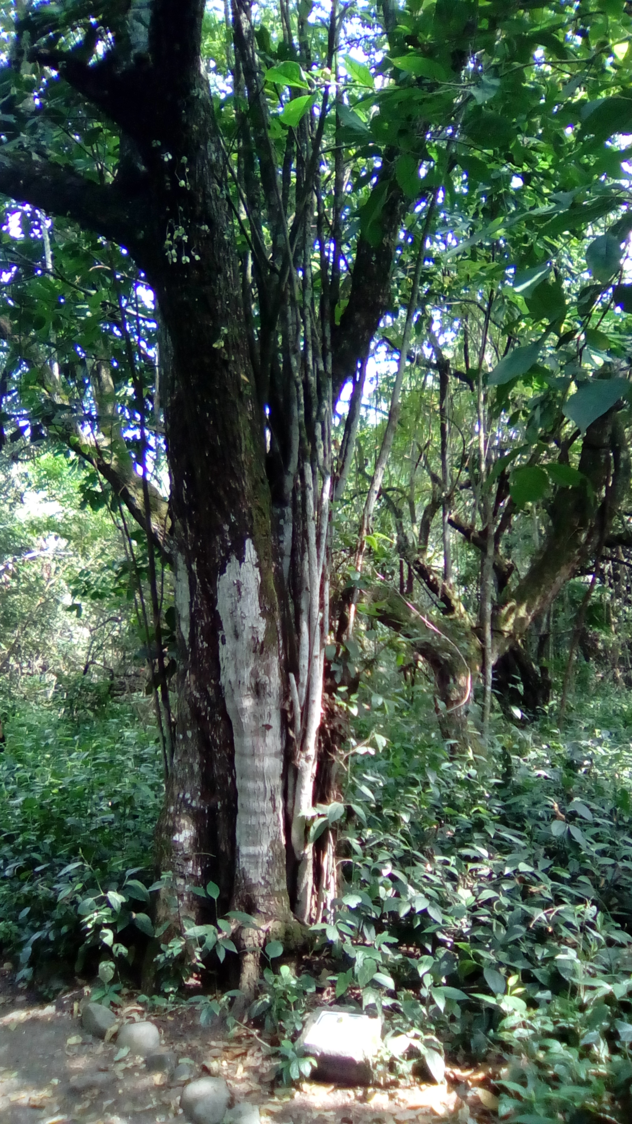 Especimen de Guazuma ulmifolia, conocido localmente como Guásimo, en el Jardín botánico de Cali.